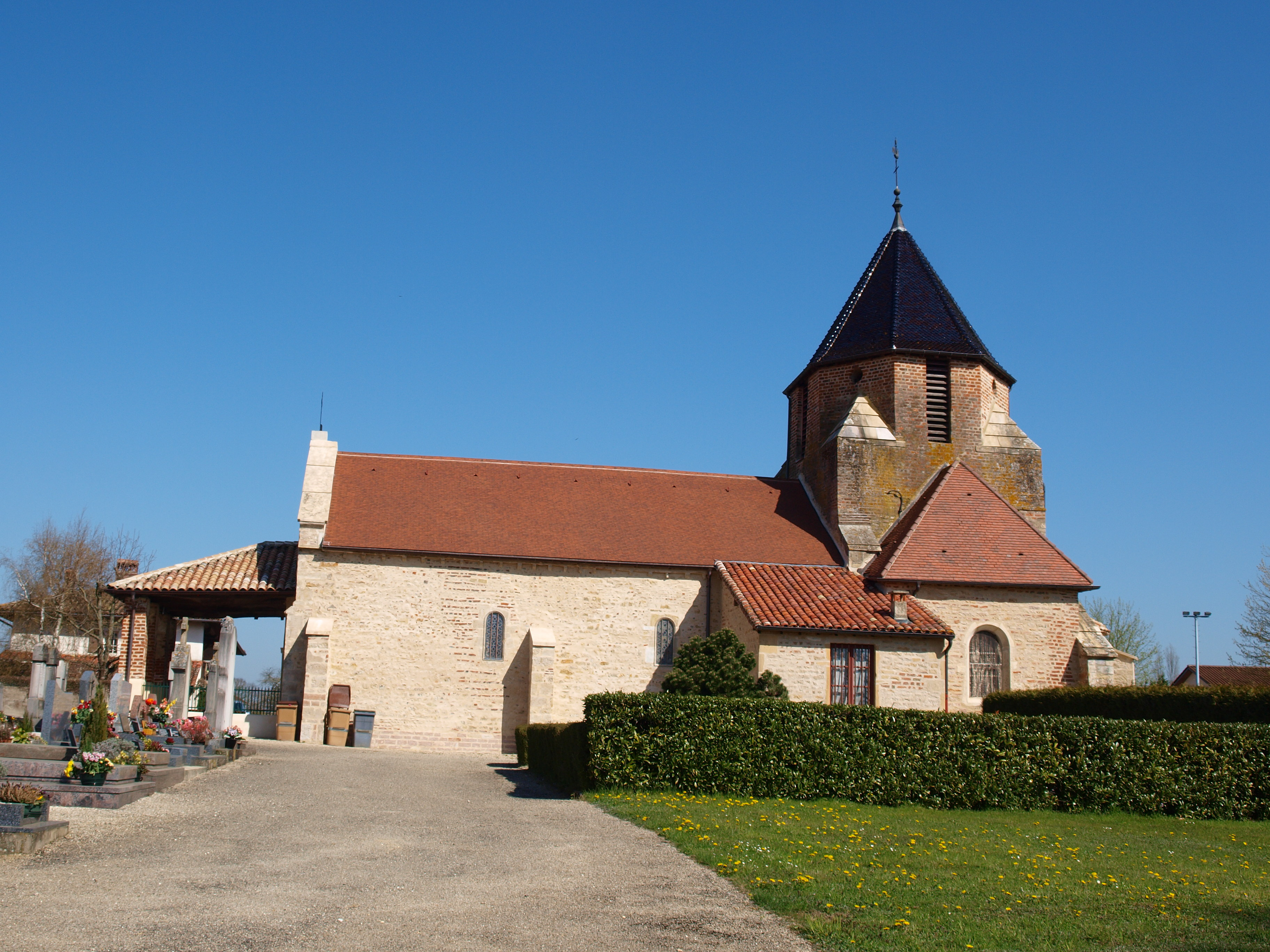 Perrex (Ain, France)